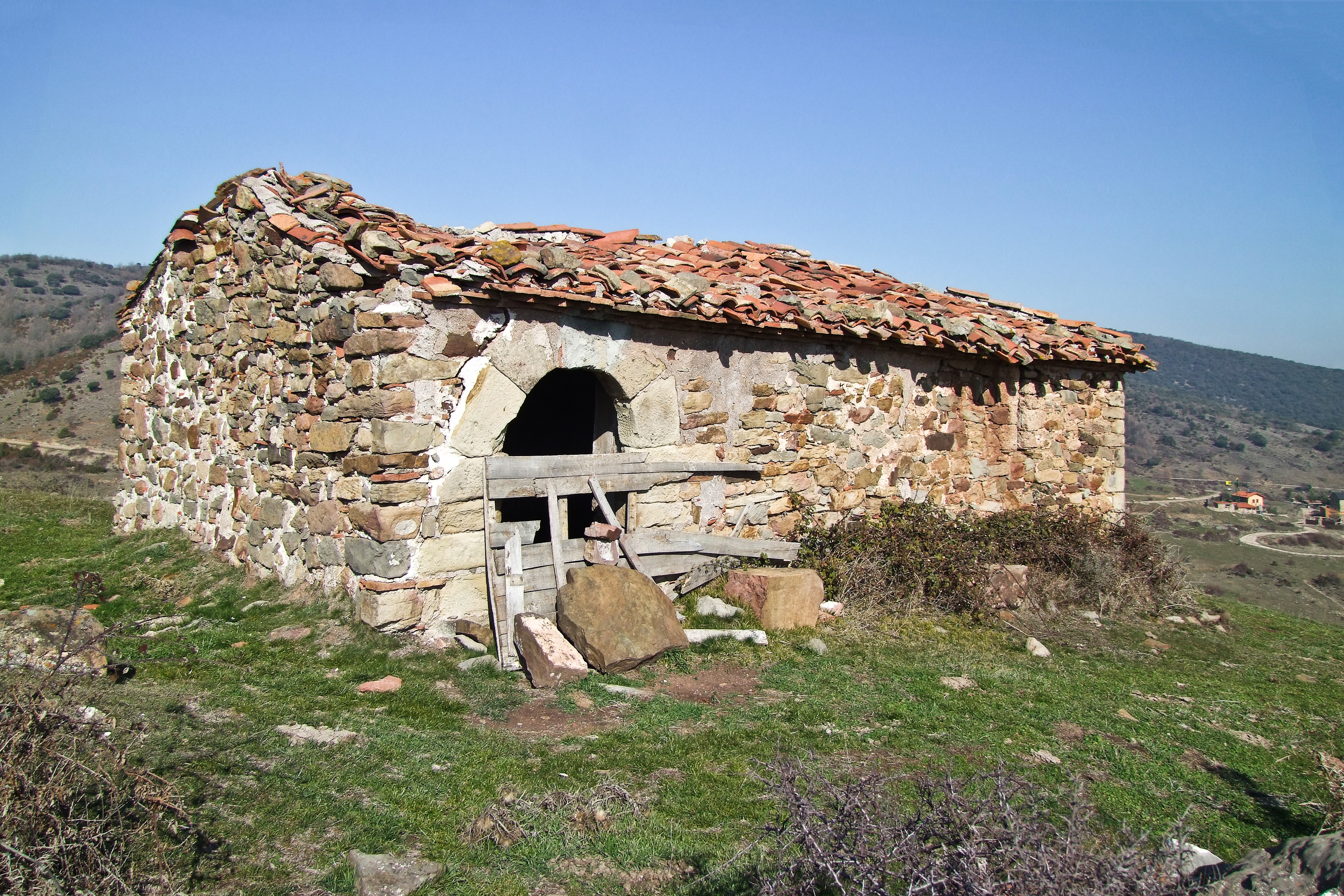 Ermita de San Cristóbal en la localidad de Zenzano, La Rioja - España